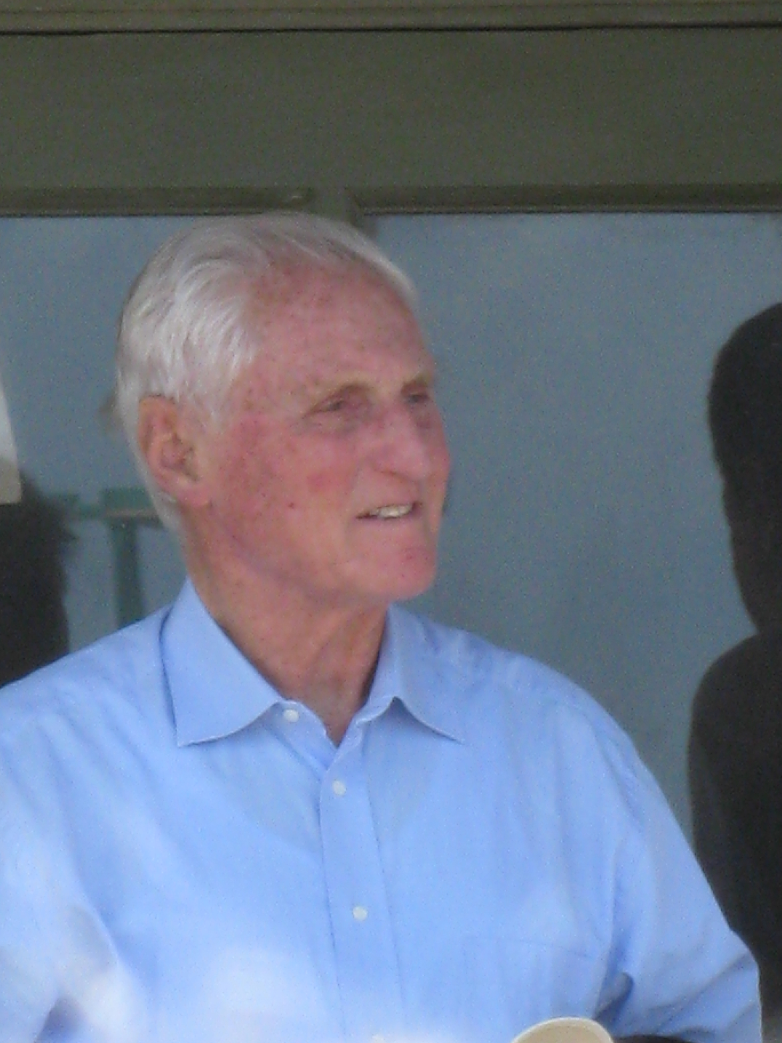 Tel Aviv 100th anniversary - Centennial Photo חגיגות המאה לתל אביב - אירוע צילום המאה במתחם התחנה בתל אביב